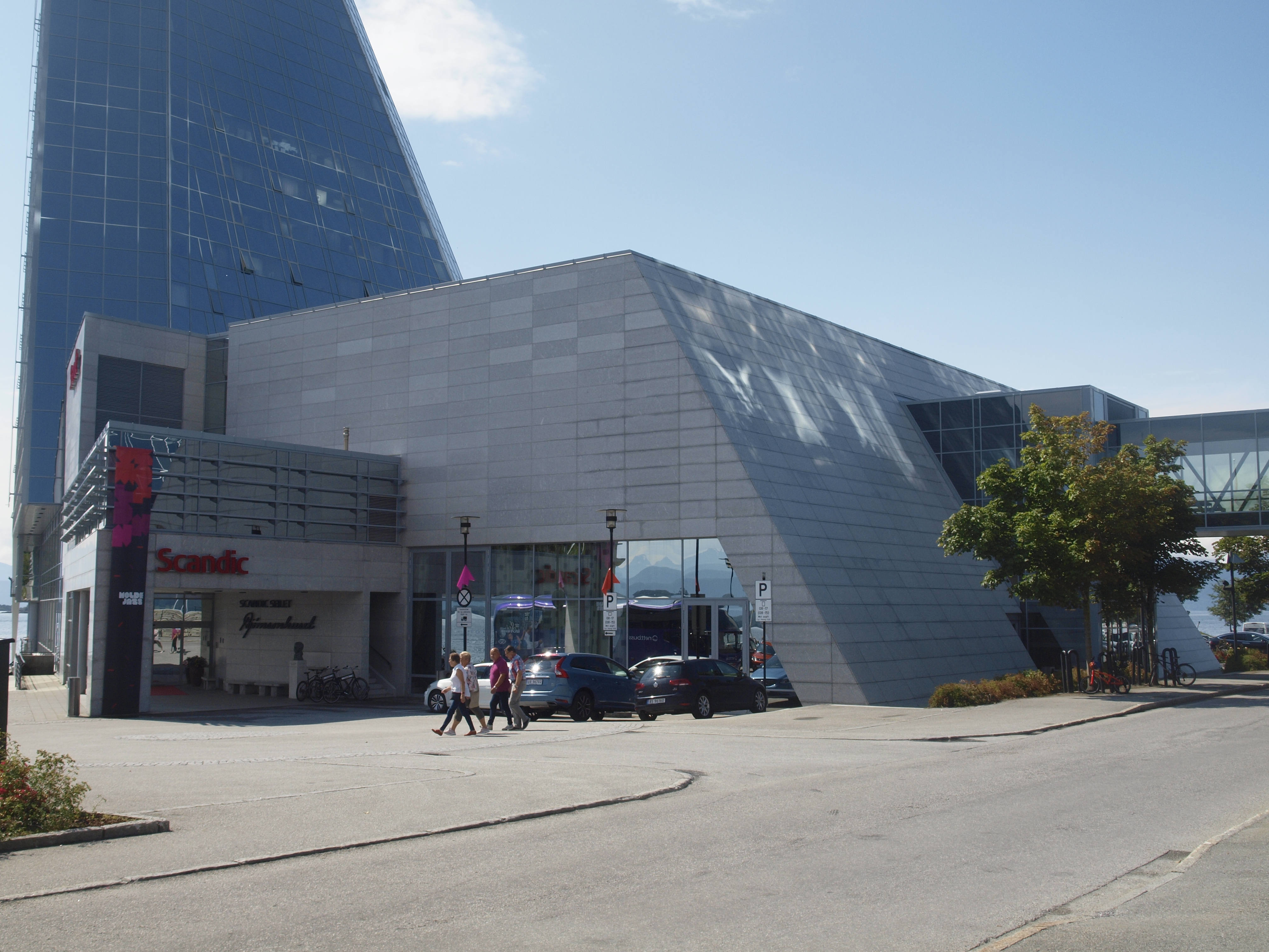 Bjørnsonhuset in Molde, Norway